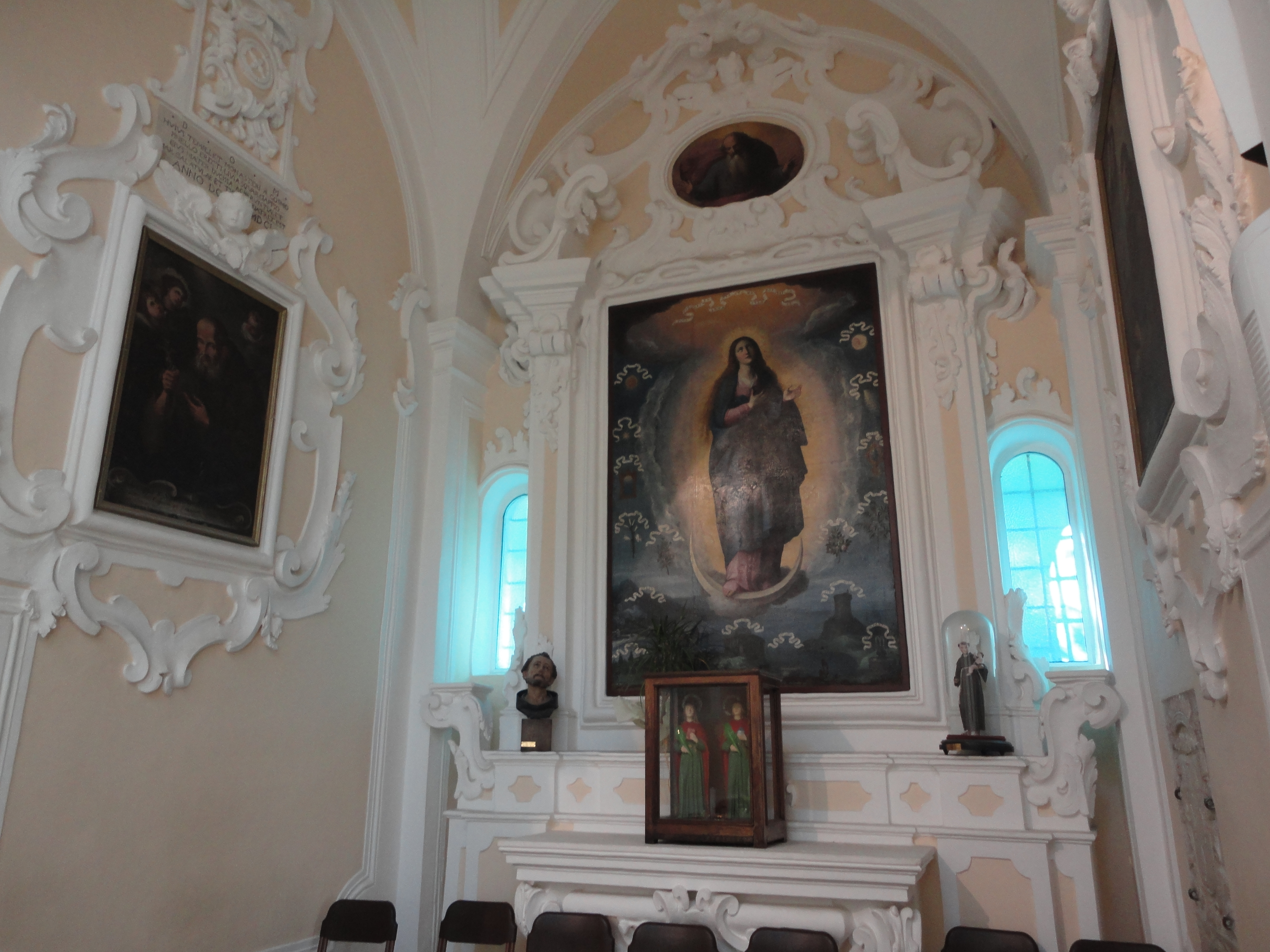 Altare Madonna Immacolata Chiesa San Francesco Galatone, Lecce